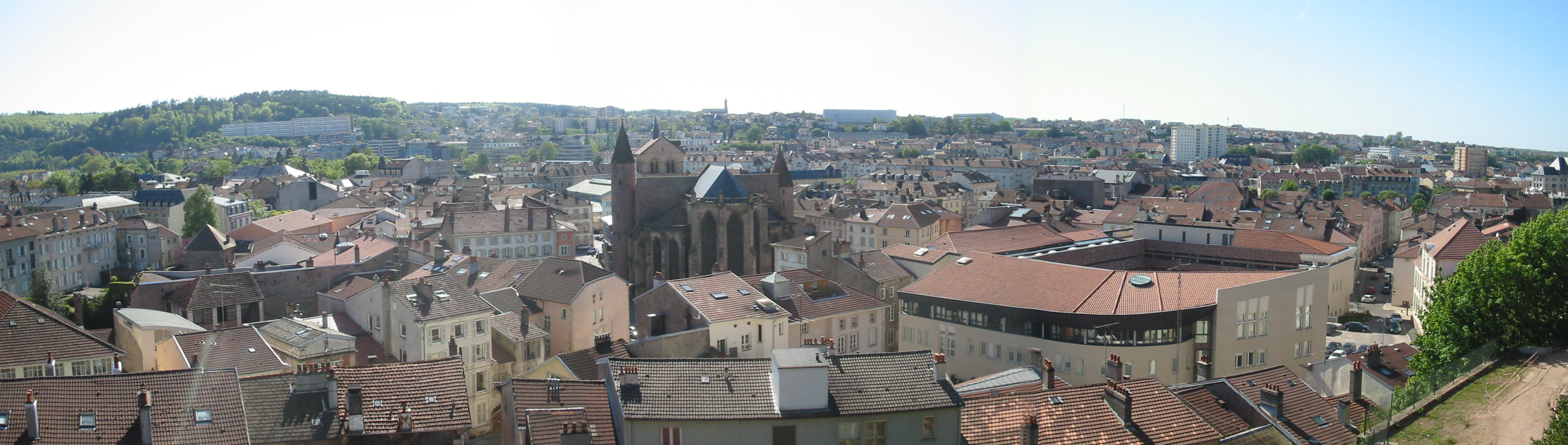 Panorama du centre historique d'Epinal. On aperçoit la Basilique Saint-Maurice Photo prise depuis les ruines du Château.